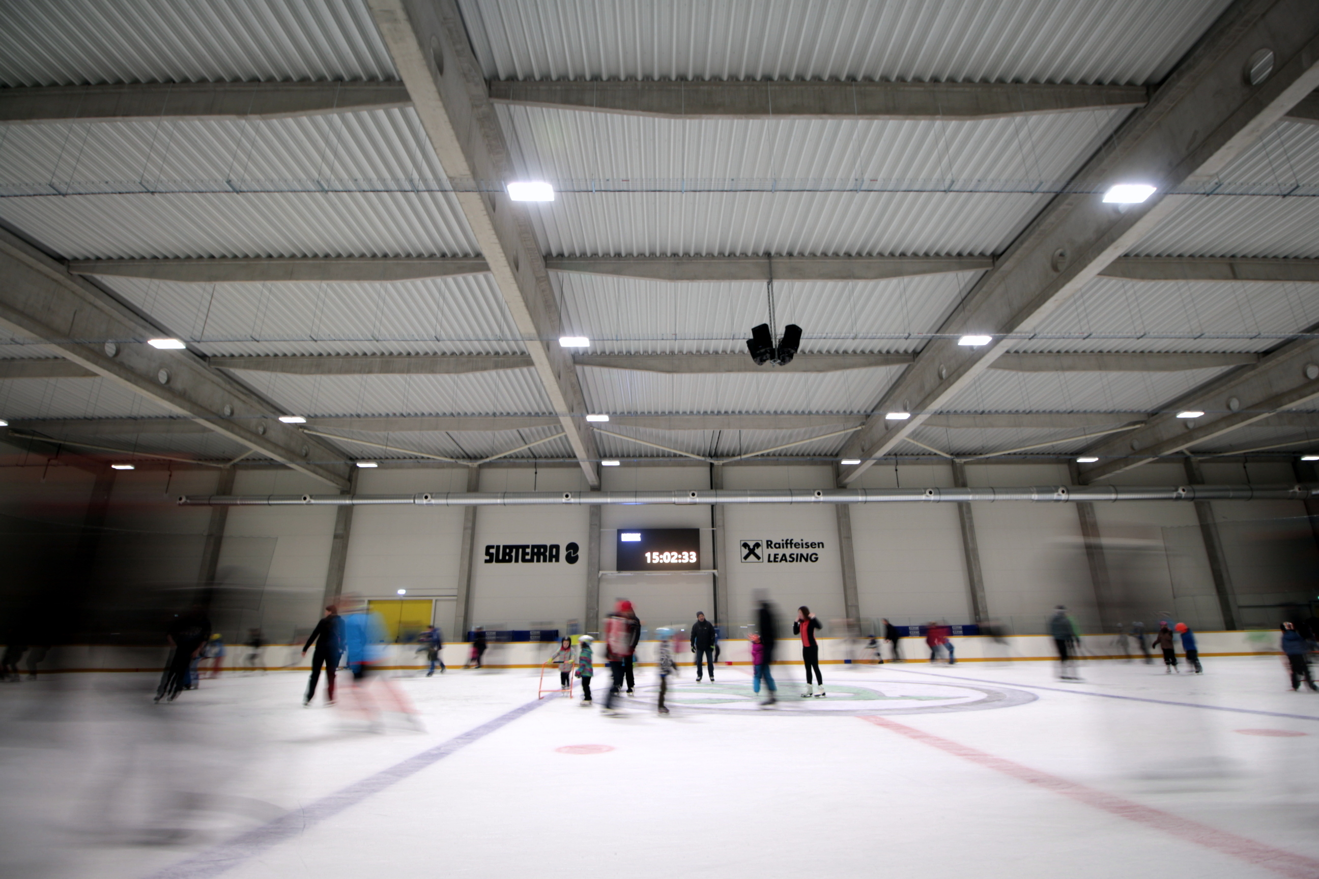 Škoda IceRink Praha